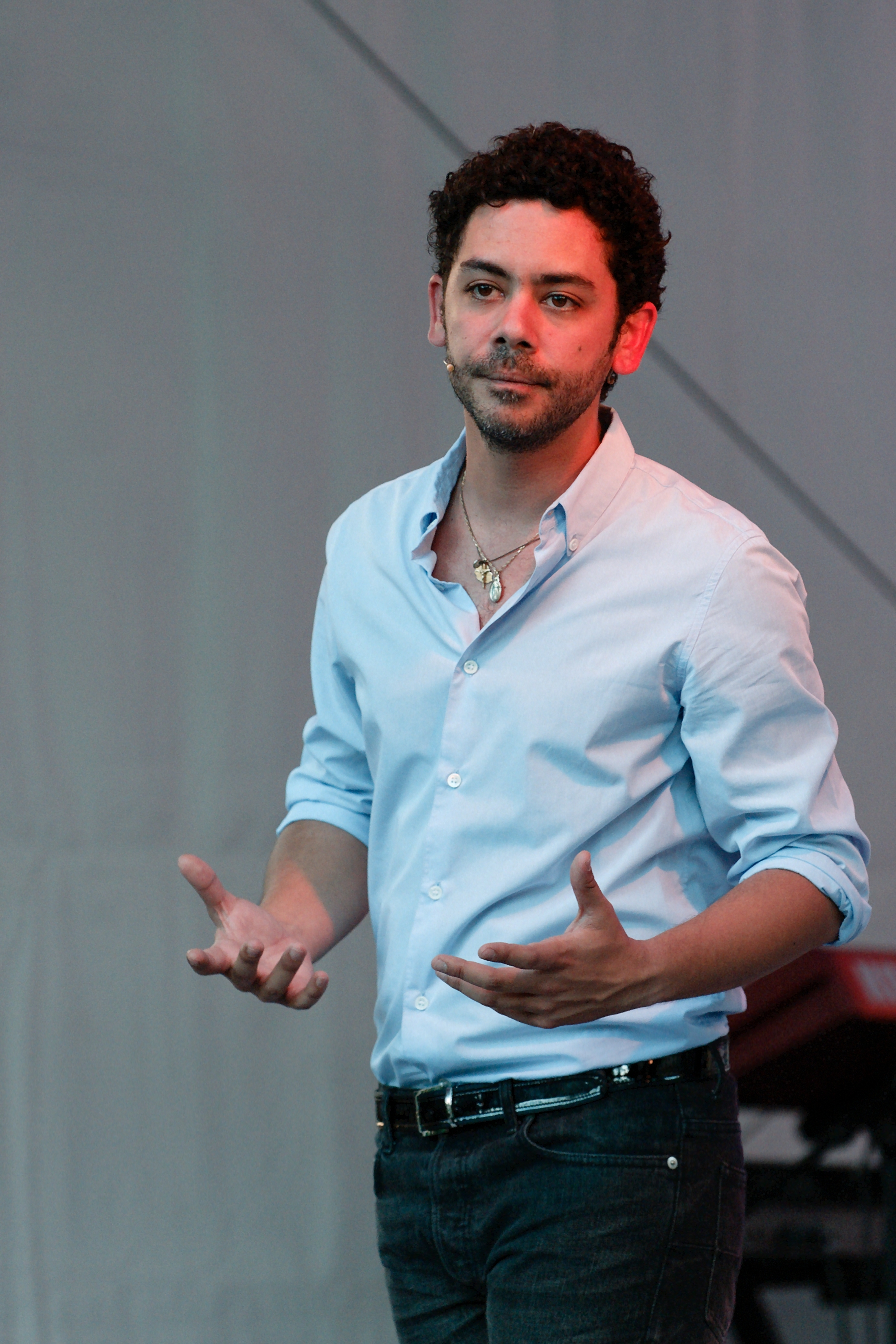 Manu Payet lors de la soirée donnée par le ministère de l'Outre-Mer pour la Fête de la Musique 2008 dans les jardins de l'hôtel de Montmorin, Paris.